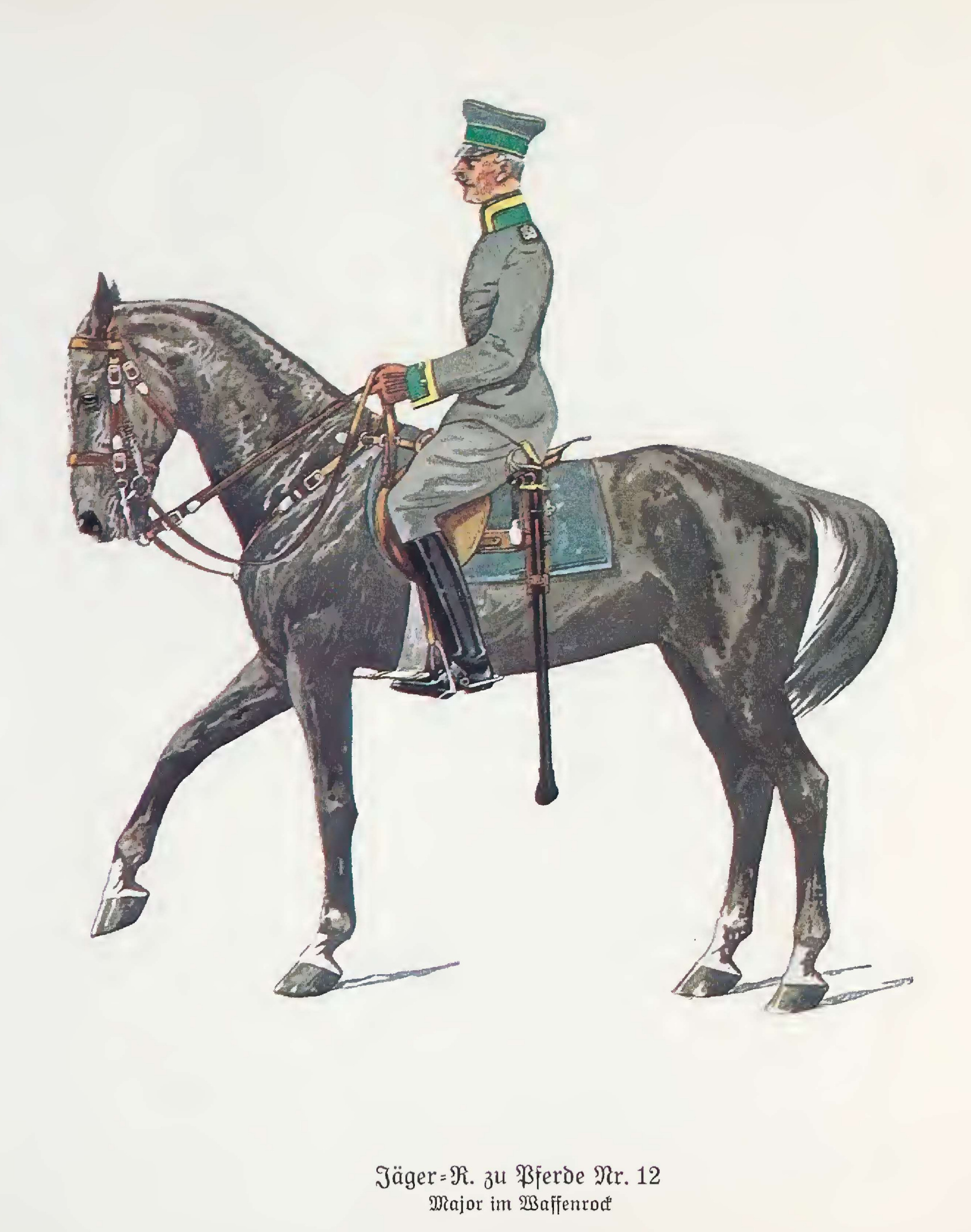 Reiter des Jäger-Regiment zu Pferde Nr. 12 in feldgrauer Uniform, 1915